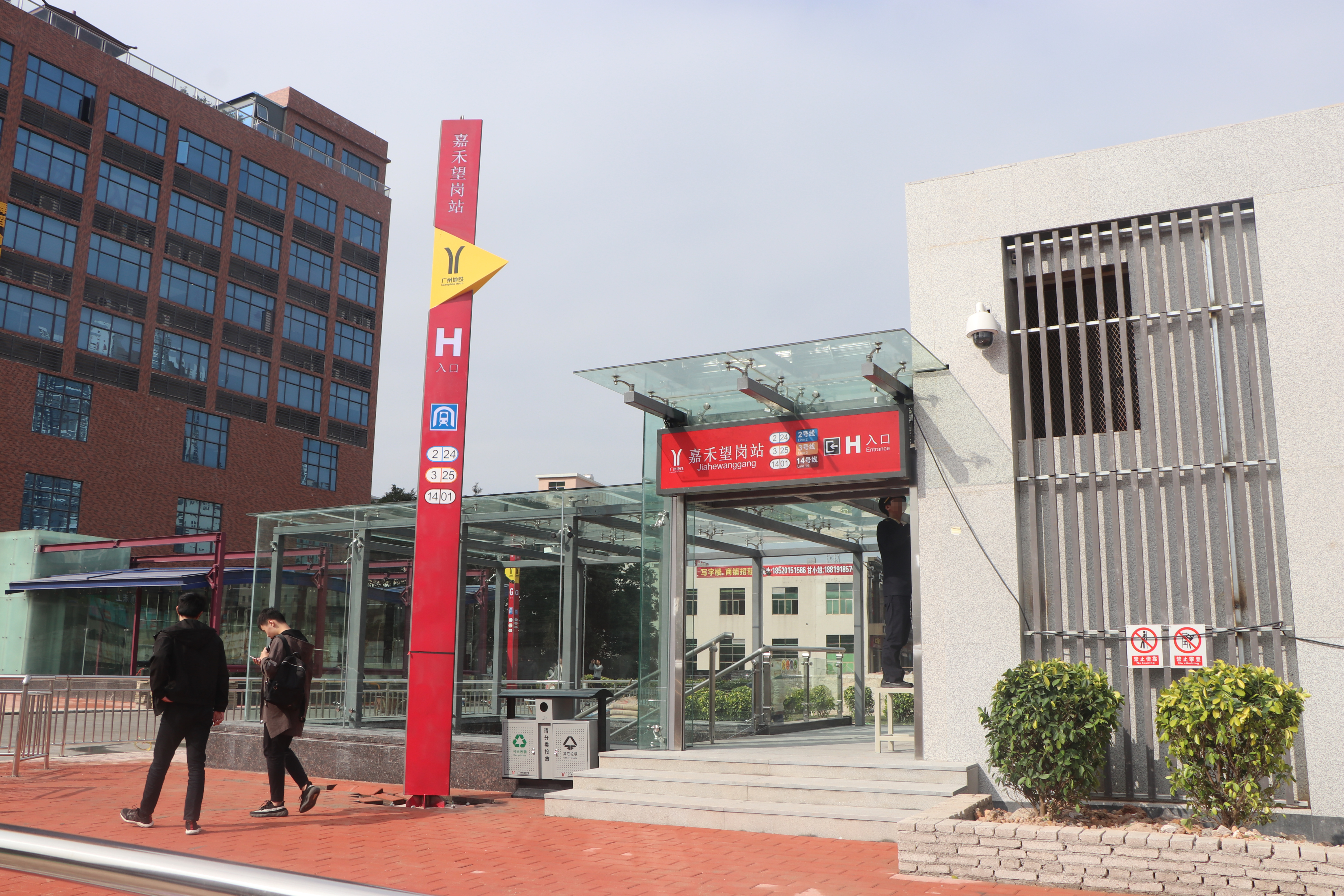 广州地铁嘉禾望岗站